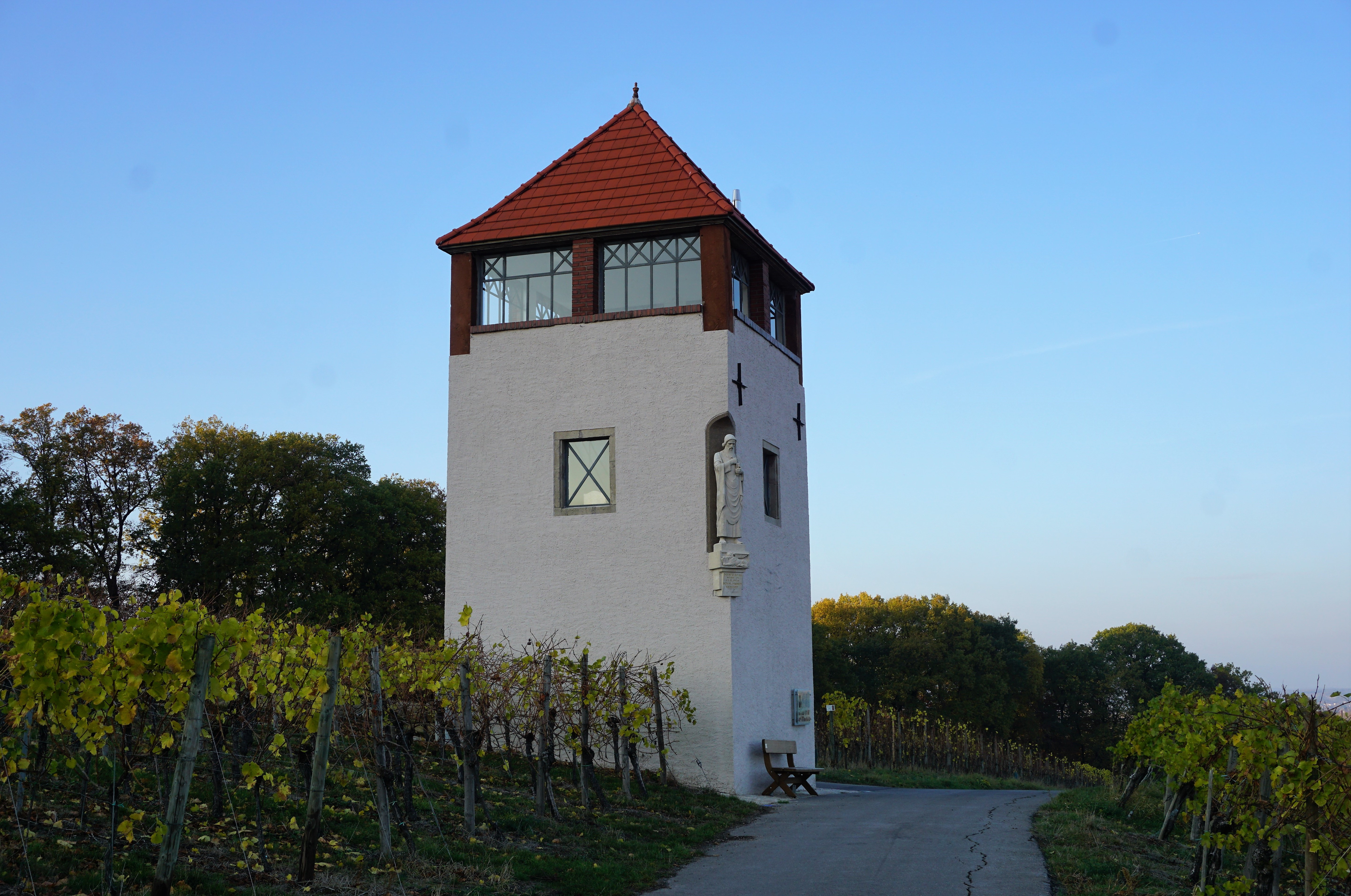 Schengen, Luxembourg. Le vignoble Markusbierg (mont Marc) avec la tour dite de St Marc.